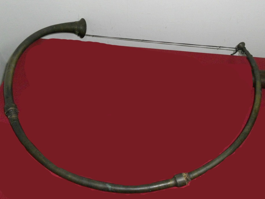 ഒരു സംഗീത ഉപകരണം